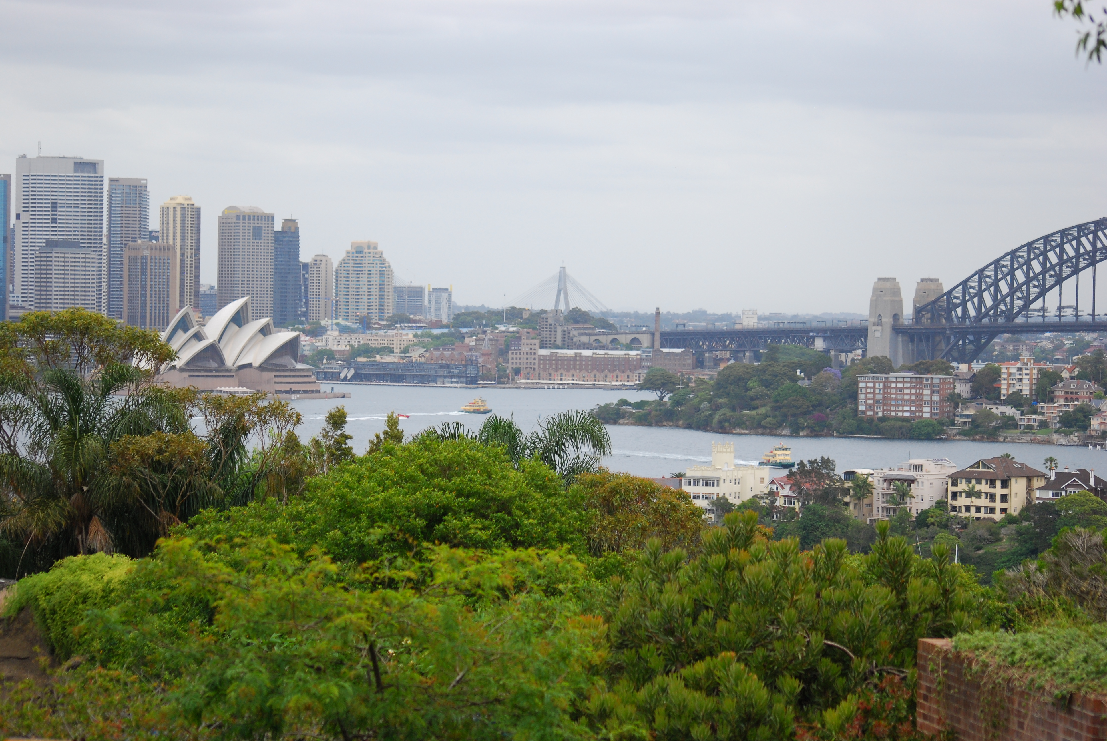 Widok z Toronga Zoo na Centrum biznesowe Sydney